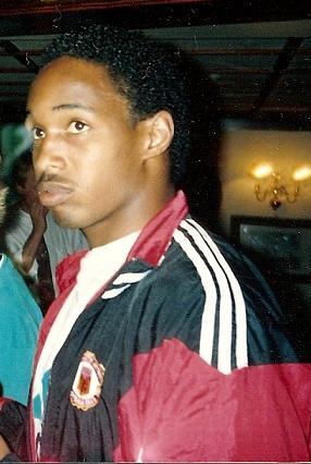 Paul Ince in 1992